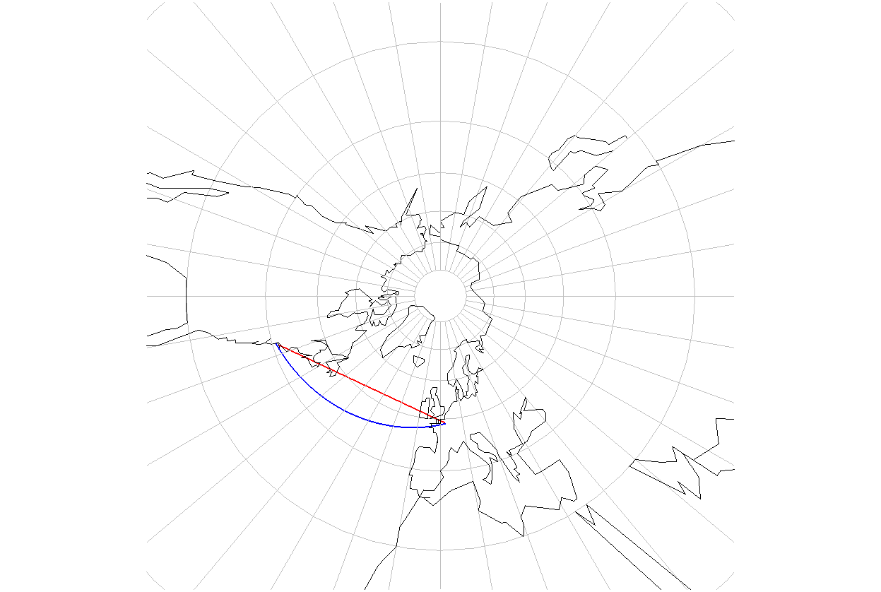 Loxodromie (en bleu) et orthodromie (en rouge) entre Paris et New-York, en projection gnomonique